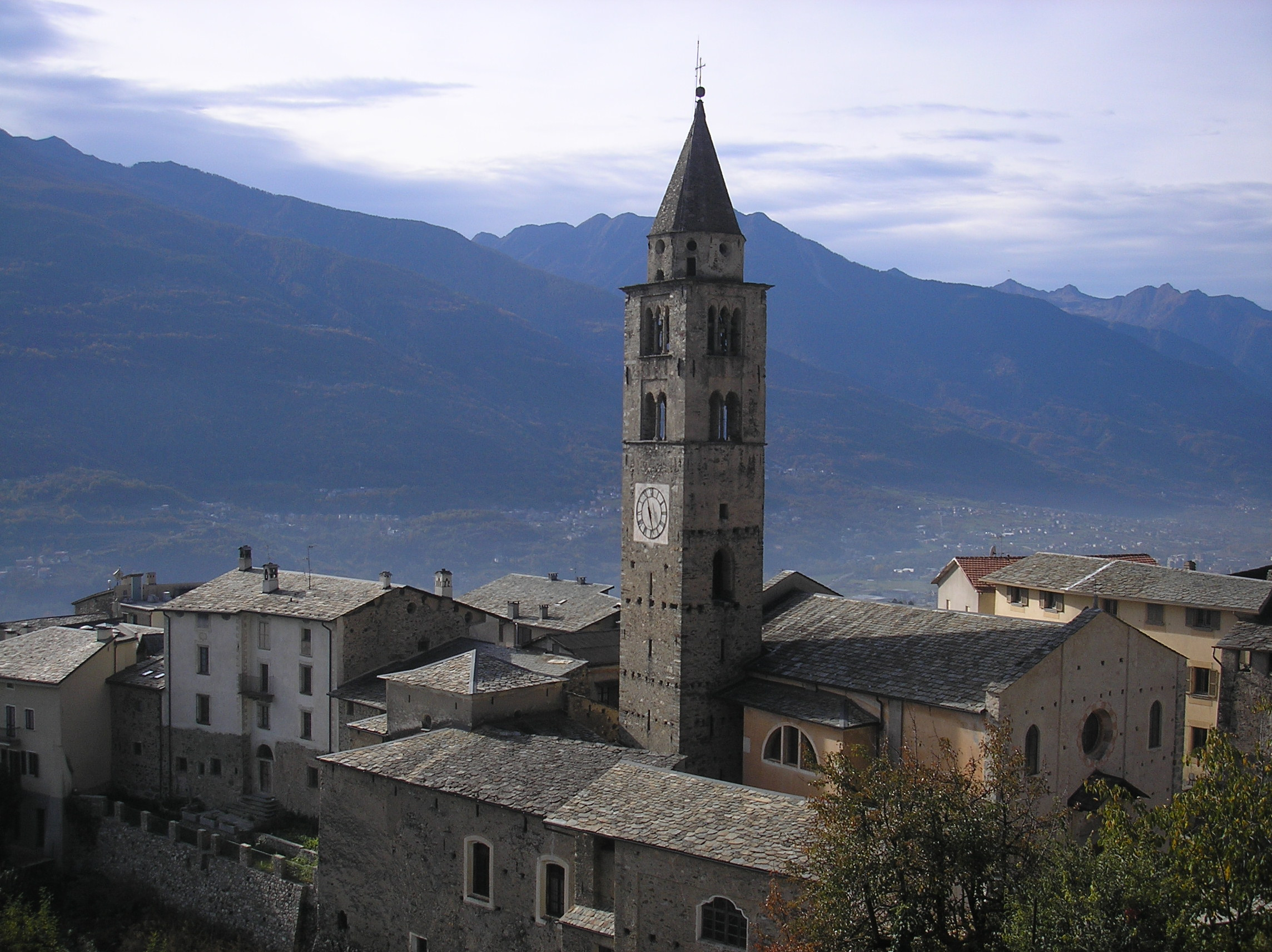 Montagna in Valtellina view